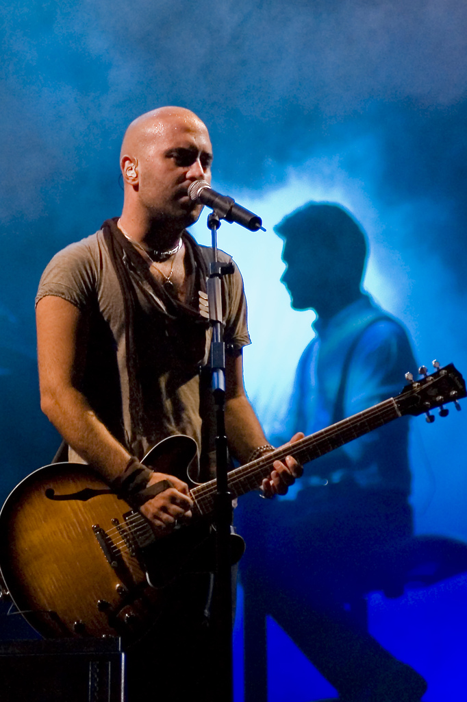 Negramaro in concerto all'Arena Flegrea di Napoli. 12 Luglio 2007